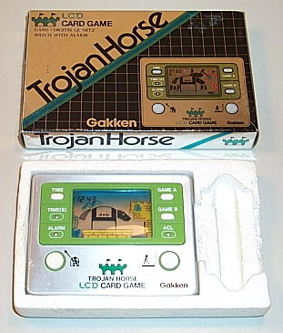 TrojanHorse, Handheld game produced by Gakken (1981)